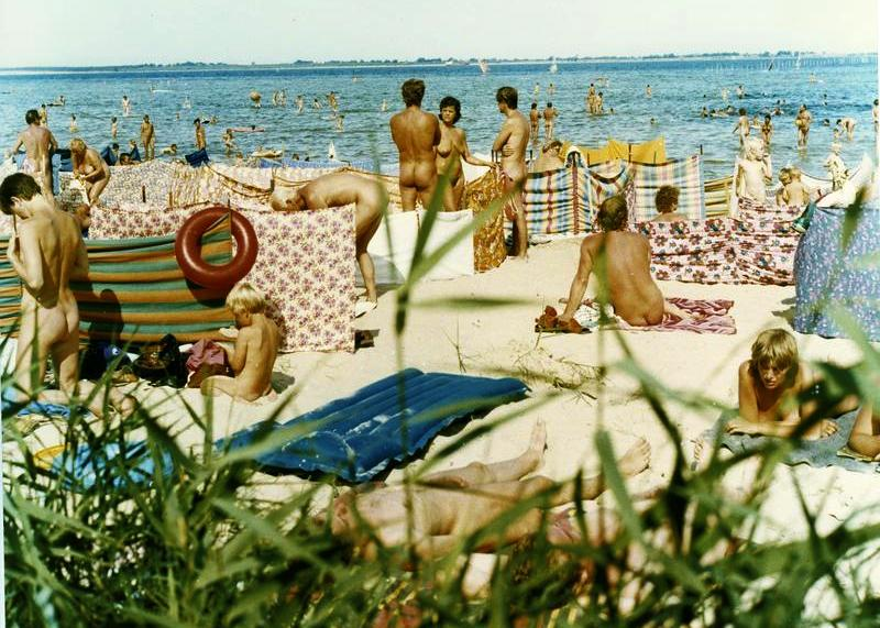 ADN-ZB/Settnik/28/8/84/Bez. Rostock: Erholung am FKK-Strand von Hohenwieschendorf an der Wismarer Bucht.